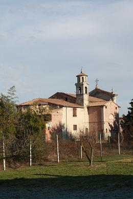 Vista della Chiesa di San Vito Martire a Cerea